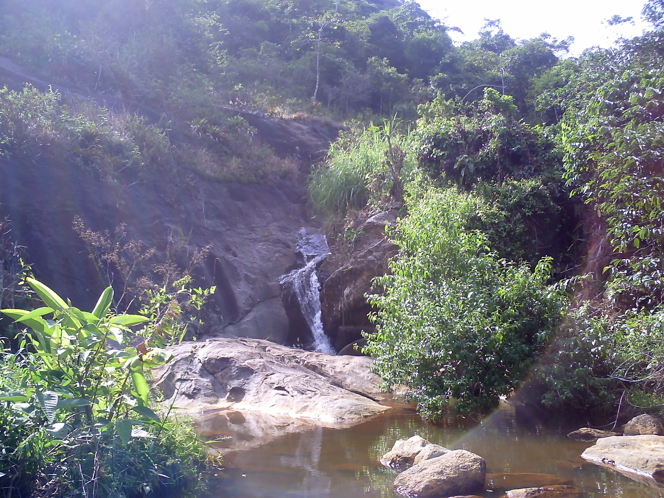 Área de Proteção Ambiental do Goiapaba-Açu, em Fundão, Espírito Santo, Brasil